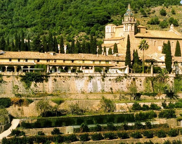 La cartuja Kartäuserkloster